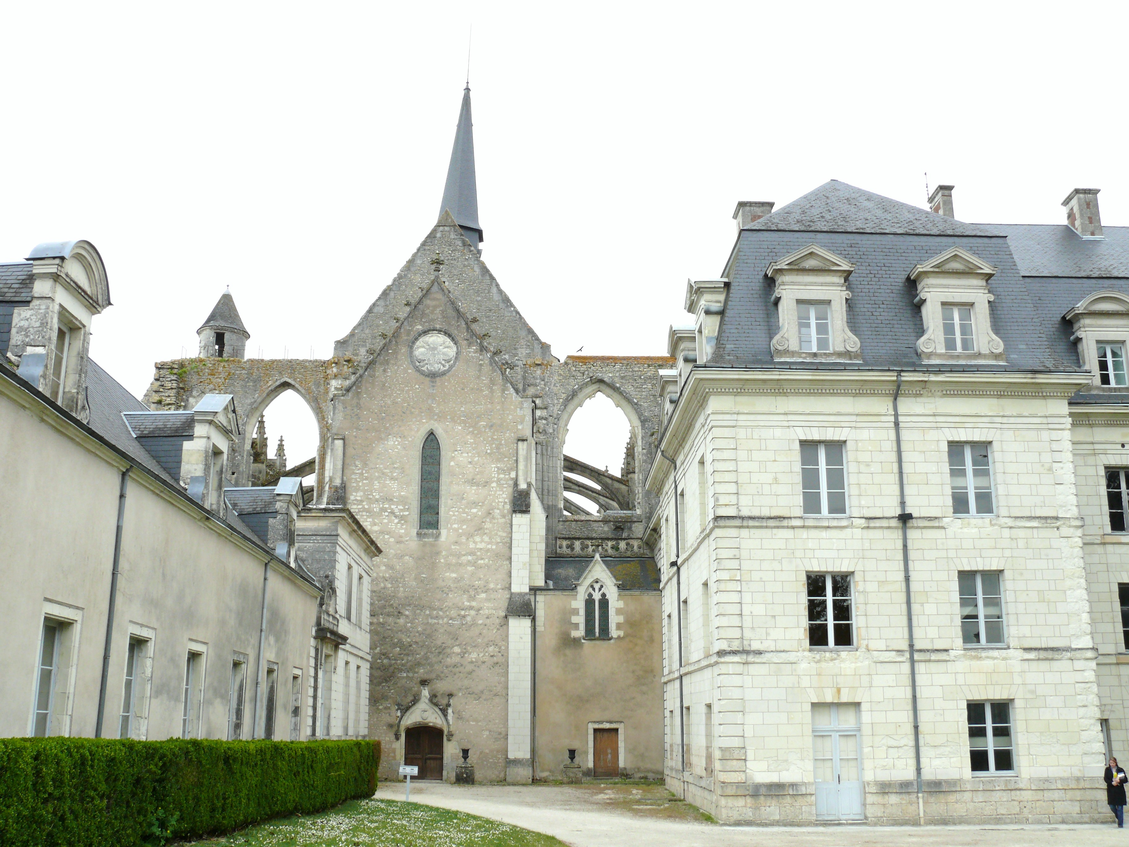 Pontlevoy - Abbaye